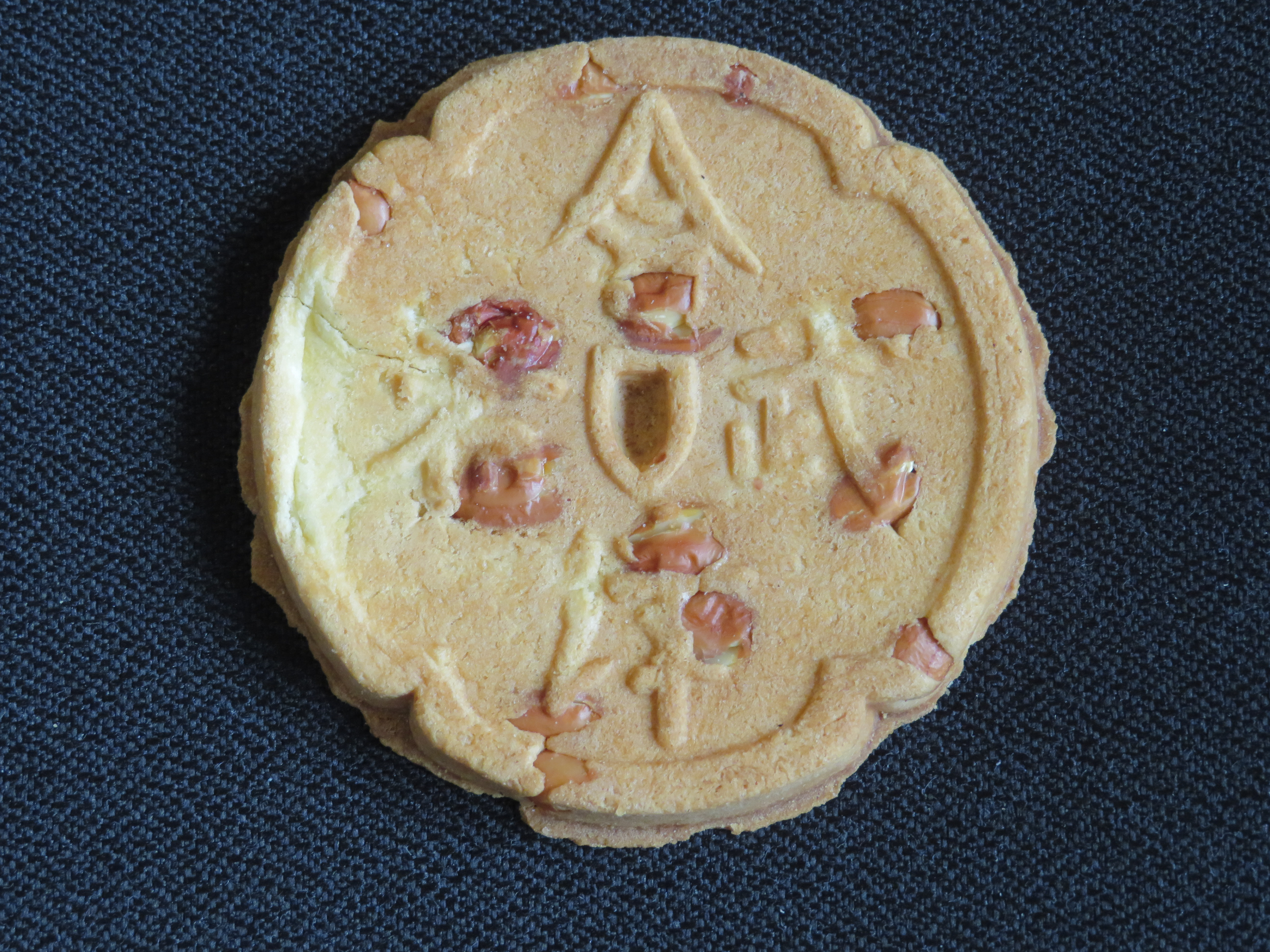 会津の武者煎餅